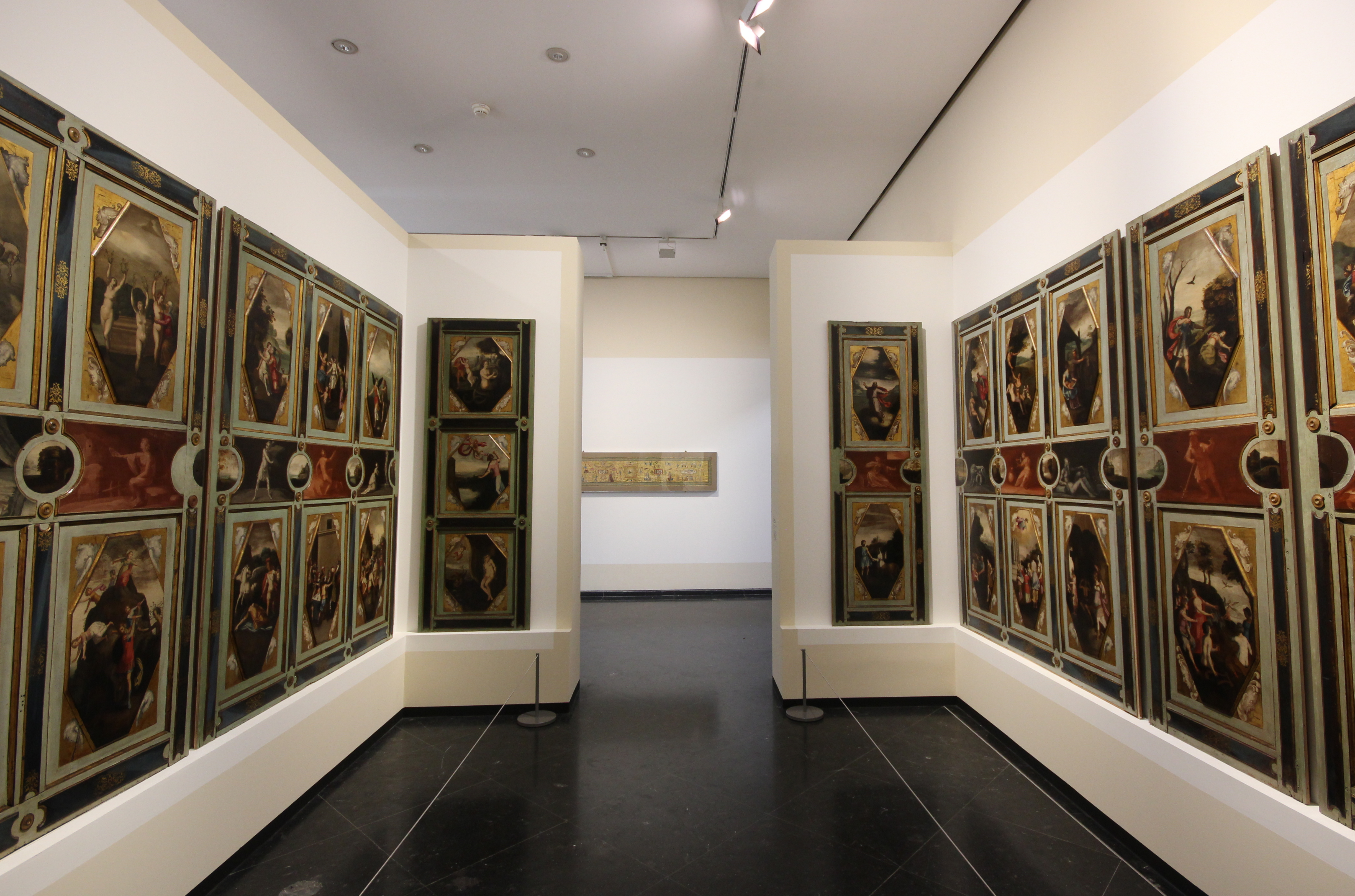 Musée des Beaux-Arts de Lyon - Exposition Lyon Renaissance - Vue des d'une partie des boiseries d'après les « Métamorphoses » de Bernard Salomon - 17ème siècle